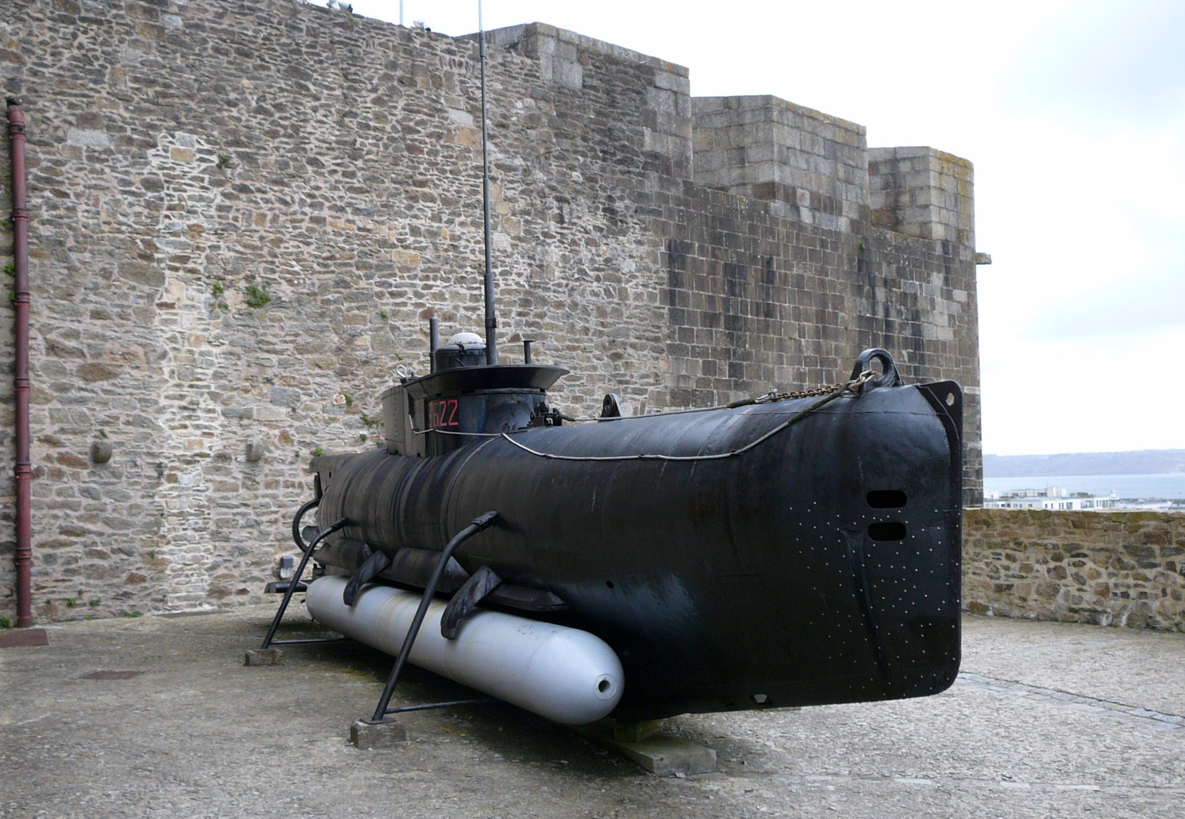 Sottomarino S622 Seehund a Brest